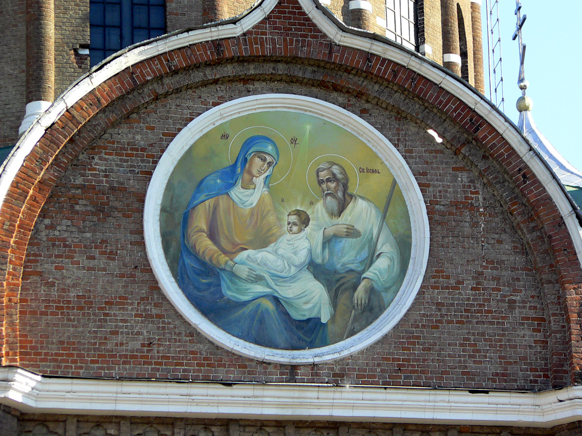 Фрагмент росписи Боголюбского собора